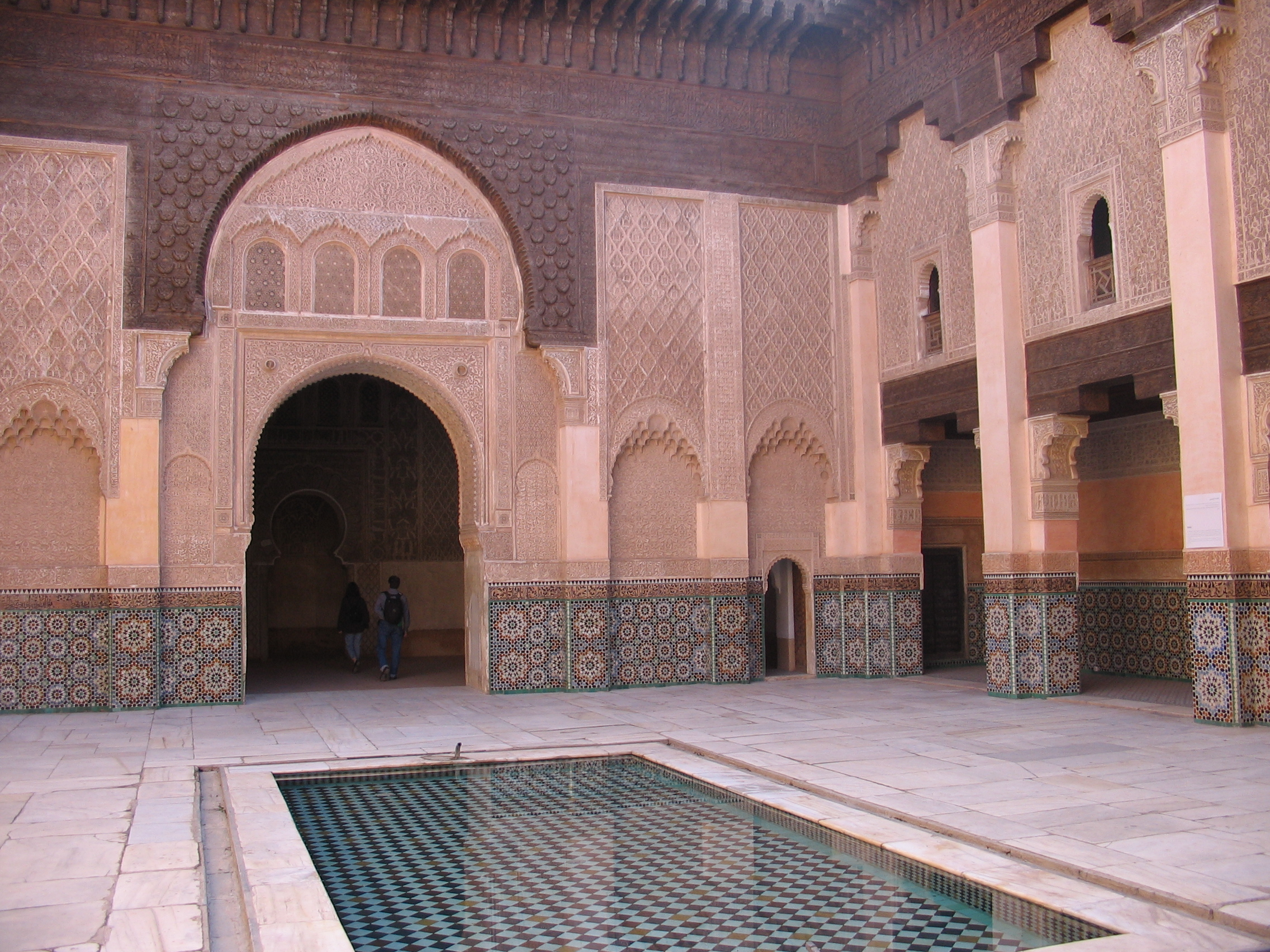 Medersa Ben Youssef